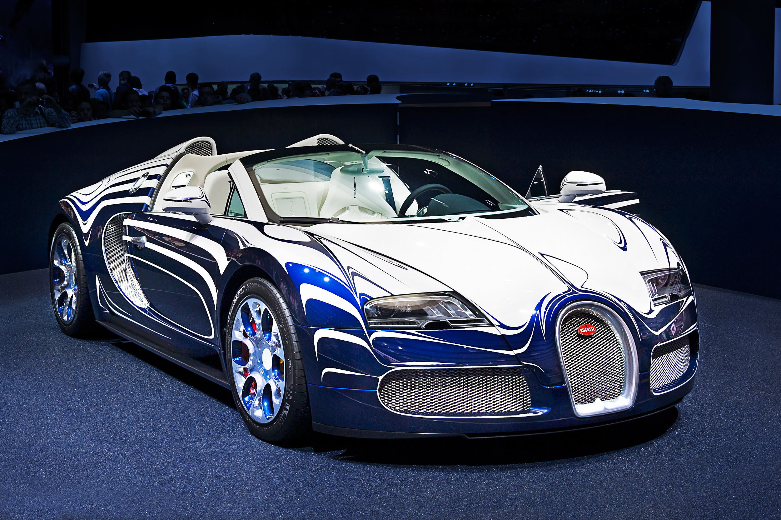 Bugatti Veyron L’Or Blanc, Internationale Automobilaustellung, 2011 in Frankfurt am Main, Germany.